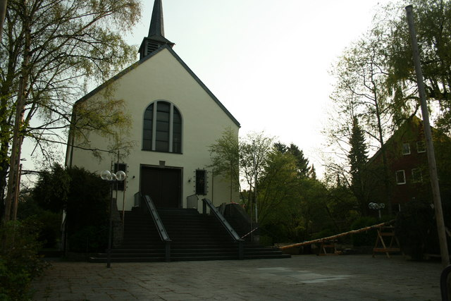 St. Konrad, Vaalserquartier, 6 km from Aachen, Deutschland (Zone 32).